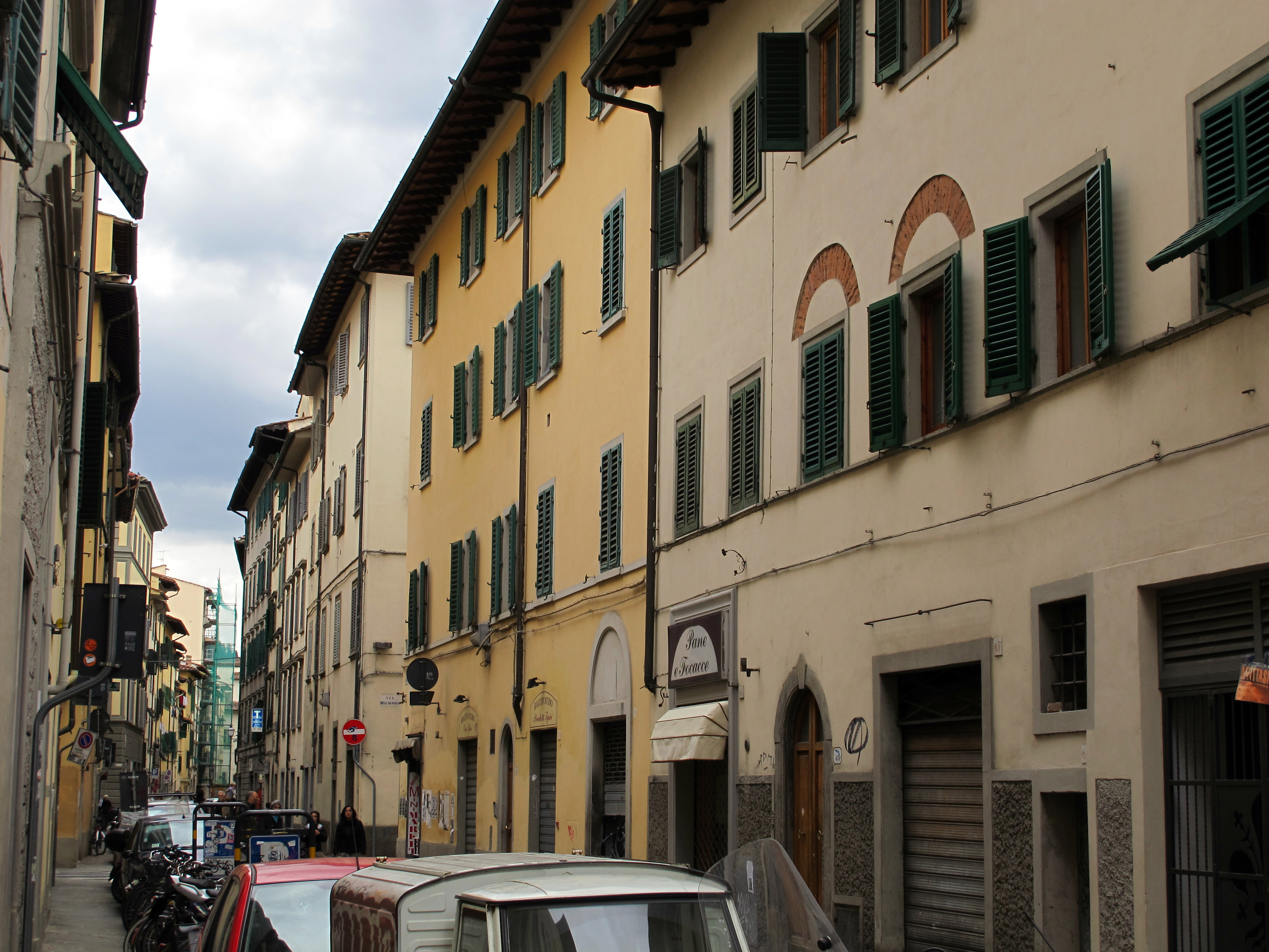 Via de' macci, veduta